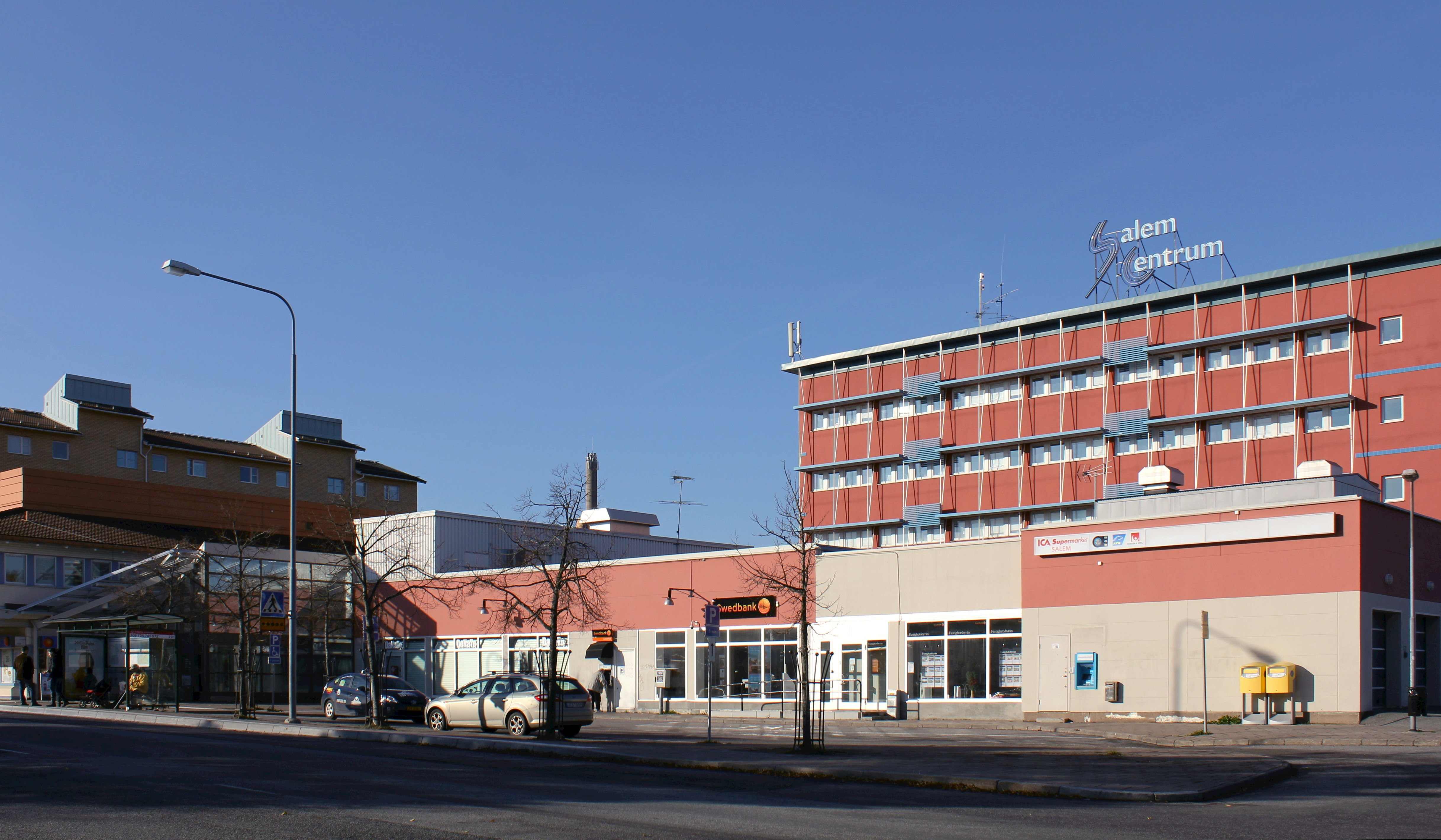 Salems centrum, Salems kommun.